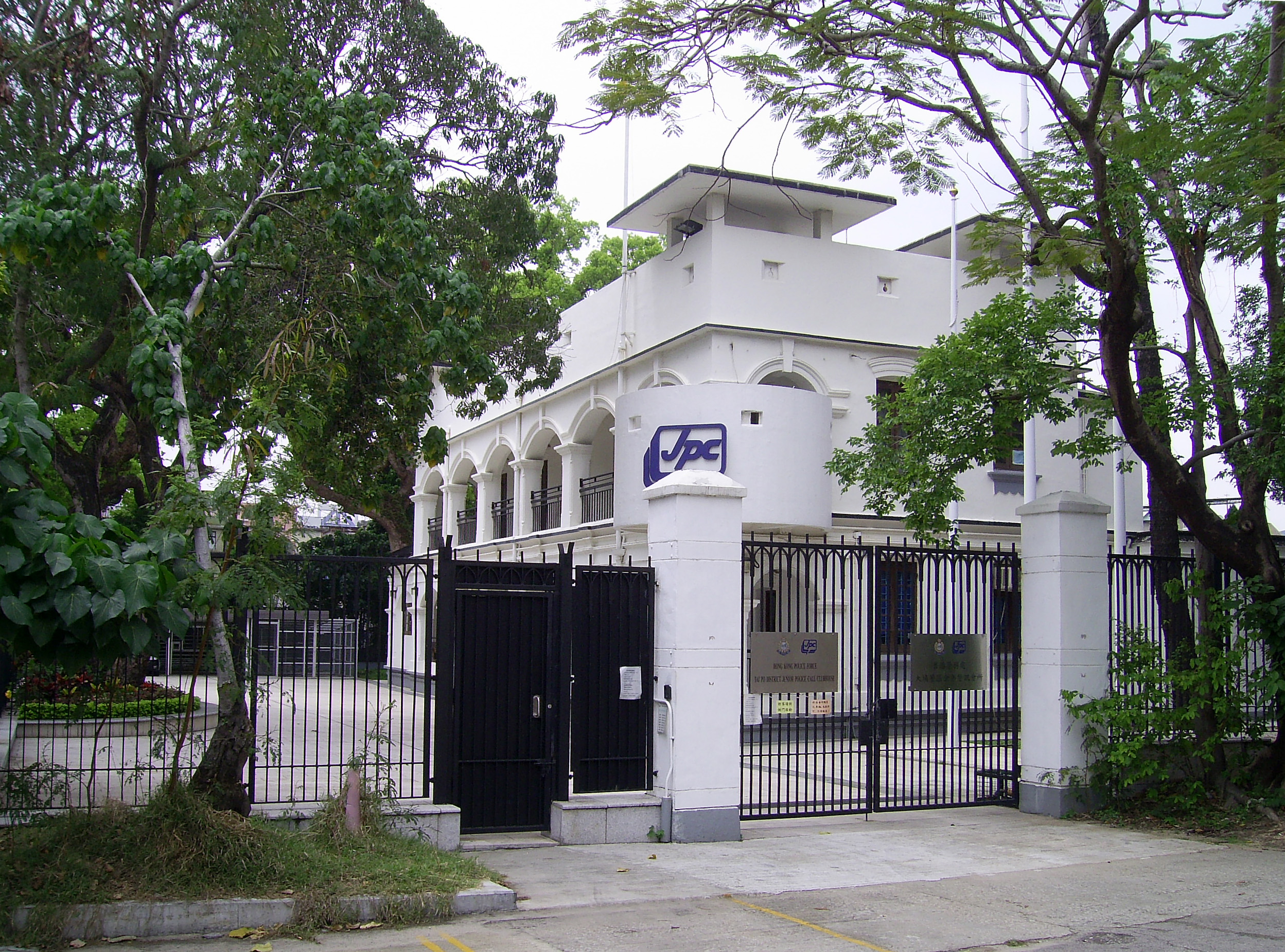 中文（香港）: 舊上水警署